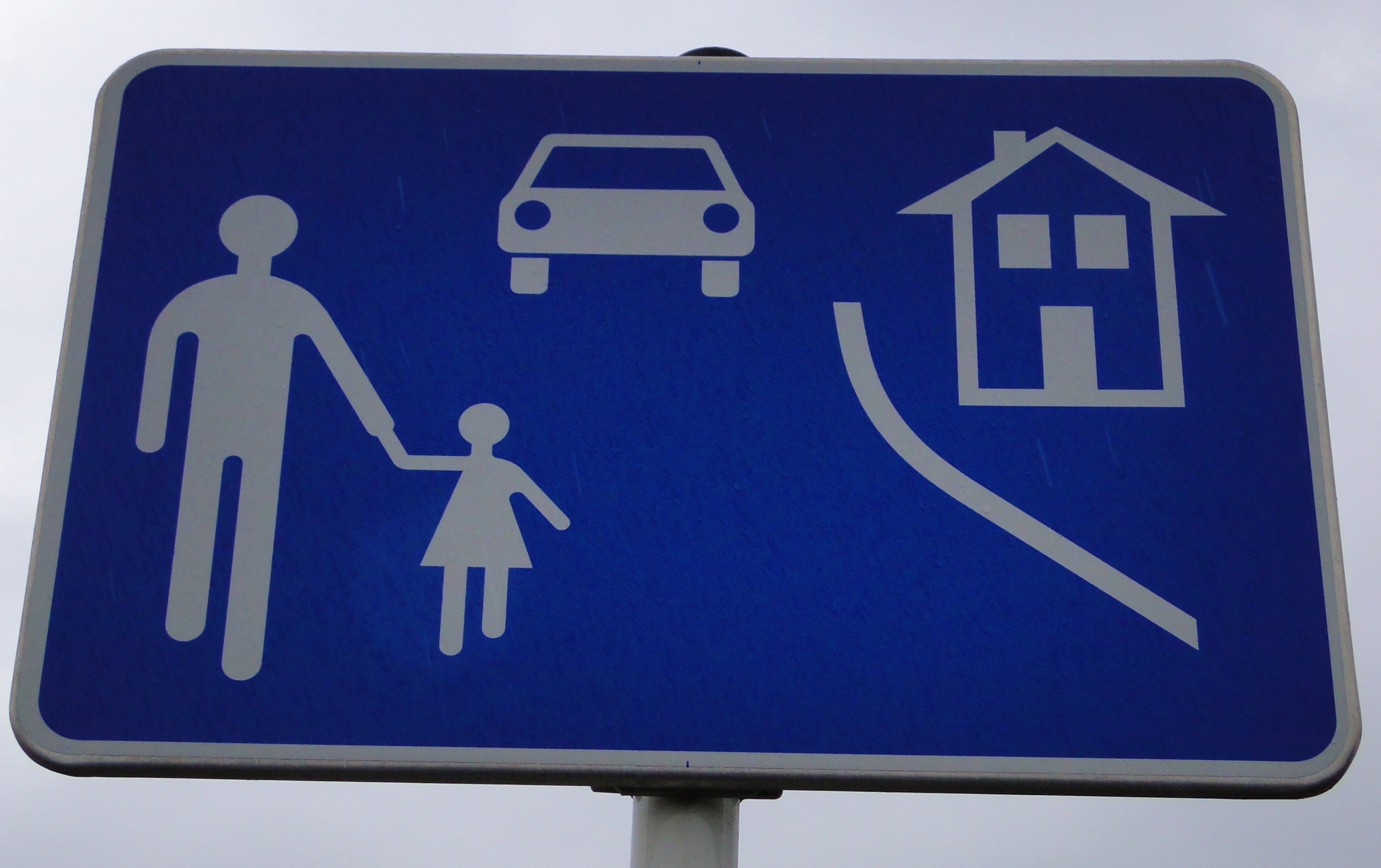 Verkéiersschëld E,26a "Zon fir sech ze begéinen" aus dem lëtzebuerger Code de la Route.